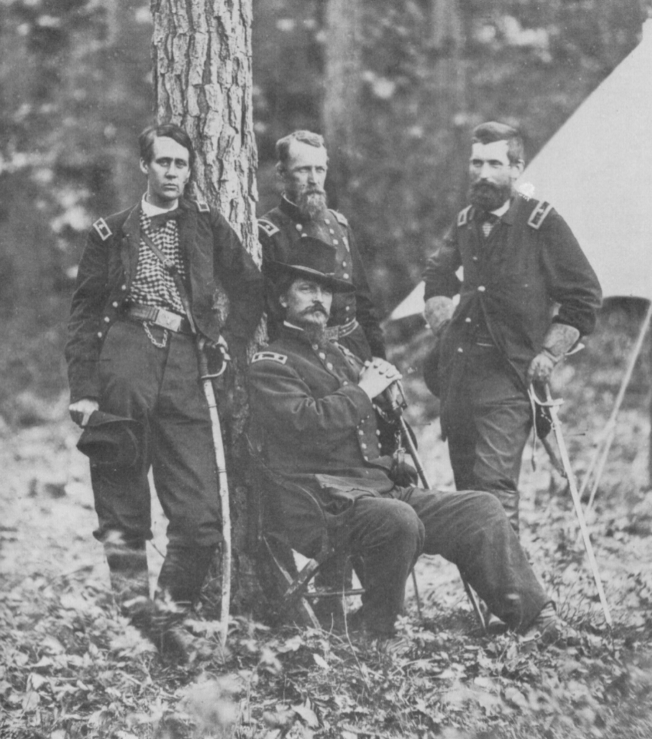 Hancock og hans divisionskommandører under Wilderness kampagnen